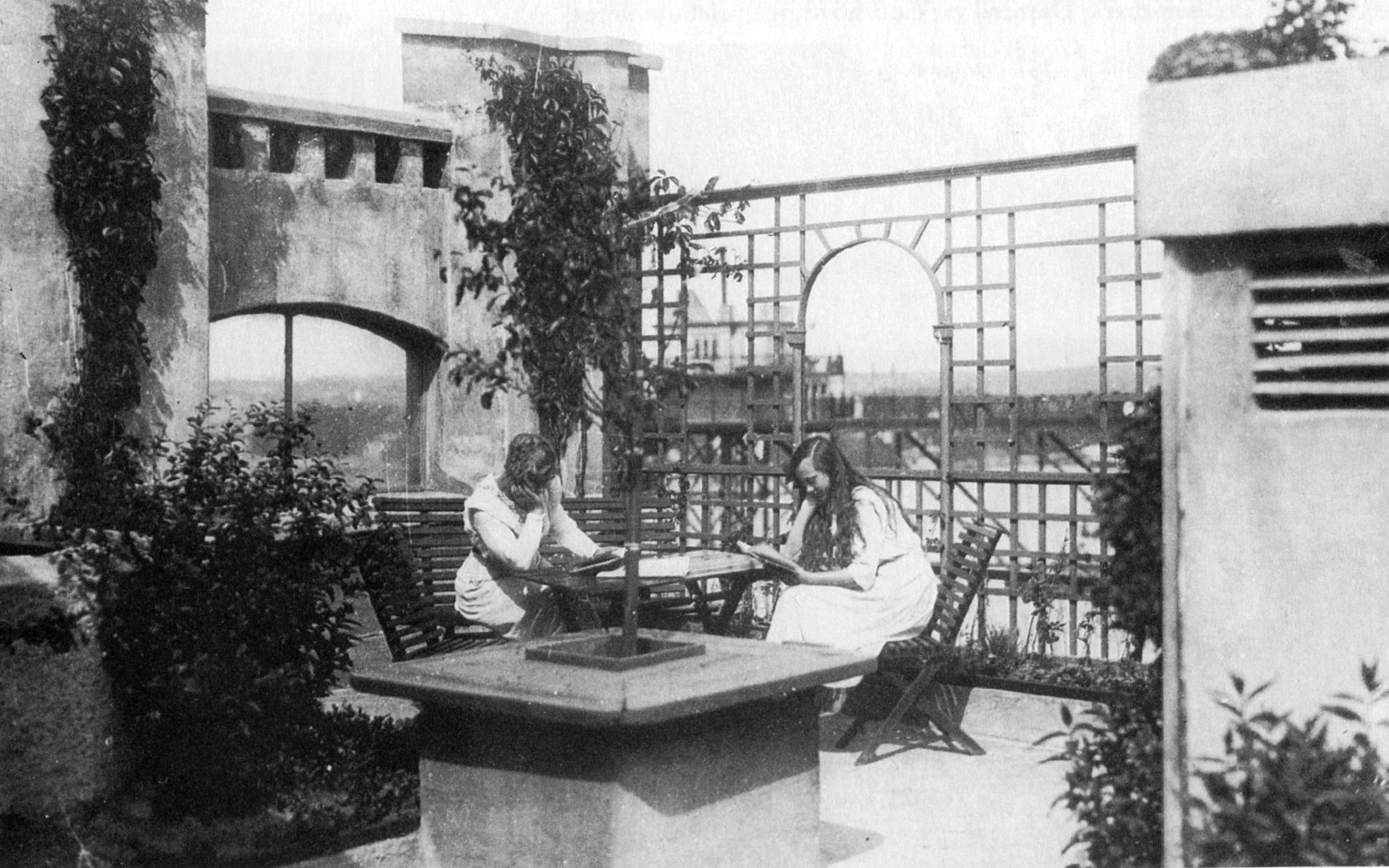 Takterrass på Götgatan 7